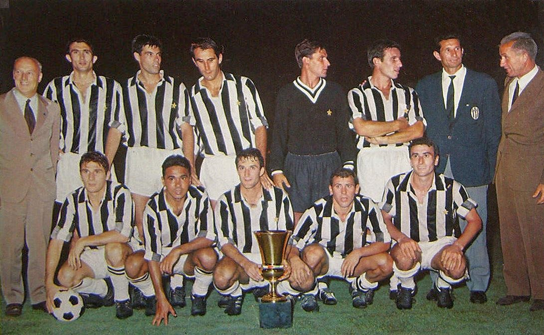 Roma, stadio Olimpico, 29 agosto 1965. La Juventus in posa dopo il successo sull'Inter (1-0) nella finale di Coppa Italia 1964-65. Da sinistra, in piedi: V. Catella (presidente), V. Traspedini, S. Salvadore, G. Bercellino (I), R. Anzolin, E. Castano (capitano), H. Herrera (allenatore), Giordanetti (vicepresidente); accosciati: G. Leoncini, Sidney Colônia Cunha "Chinesinho", G. Menichelli, C. Dell'Omodarme, A. Gori. La partita, seppur appartenente alla stagione sportiva 1964-65, venne disputata sul finire dell'agosto del 1965 vedendo pertanto in campo la rosa dell'annata 1965-66.